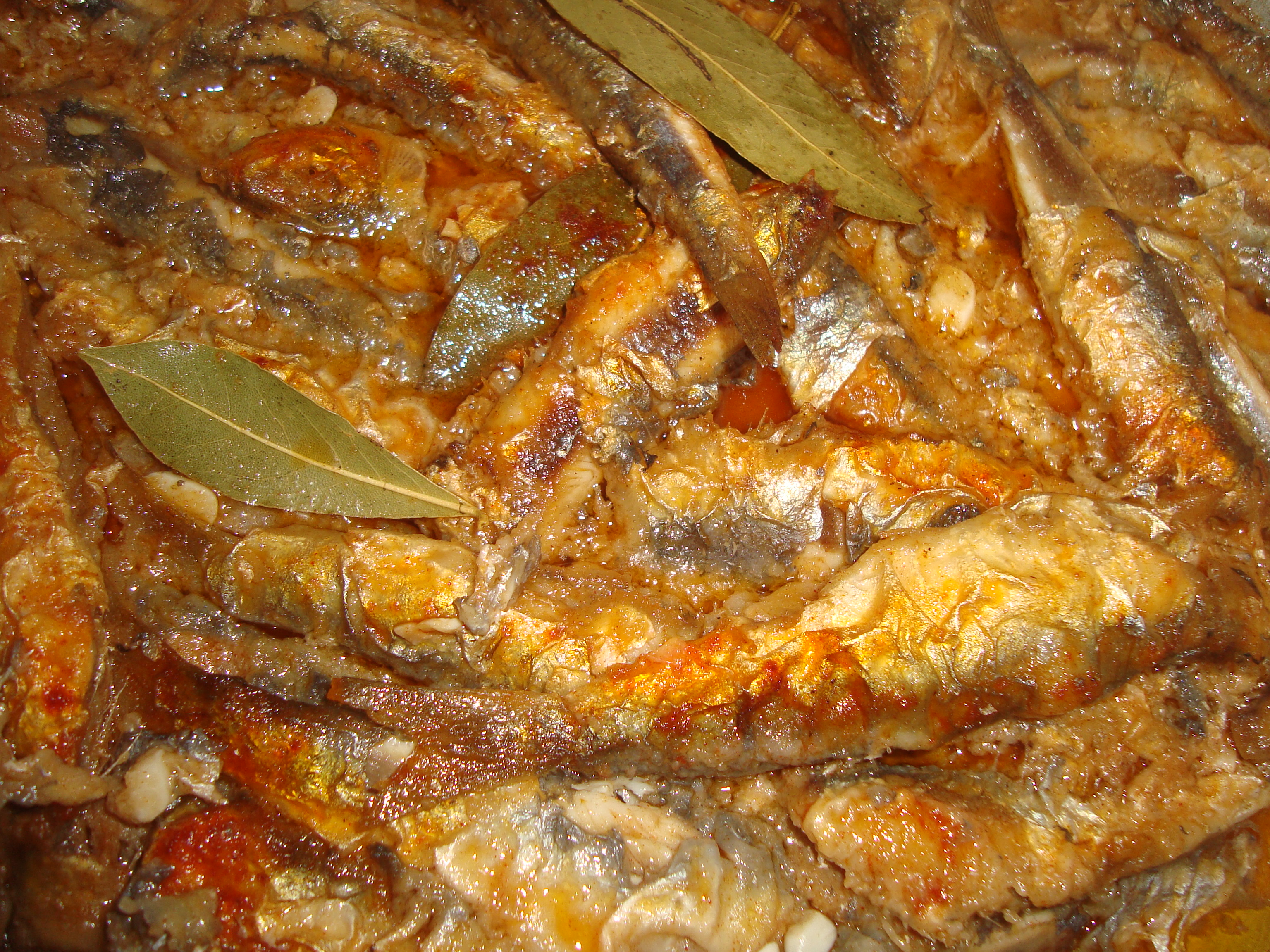 Маринованные сардины